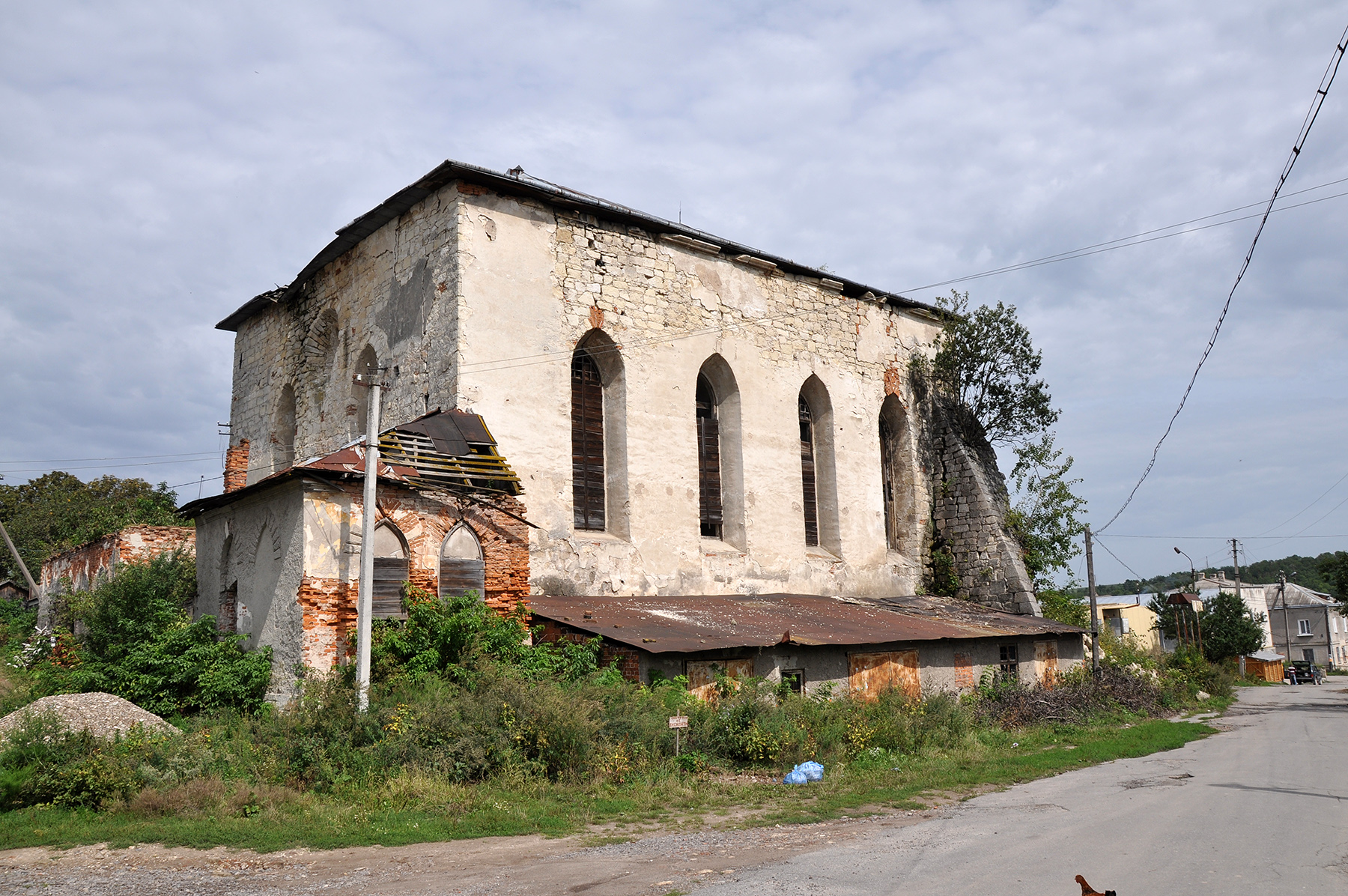 Синагога, Підгайці, вул. Замкова